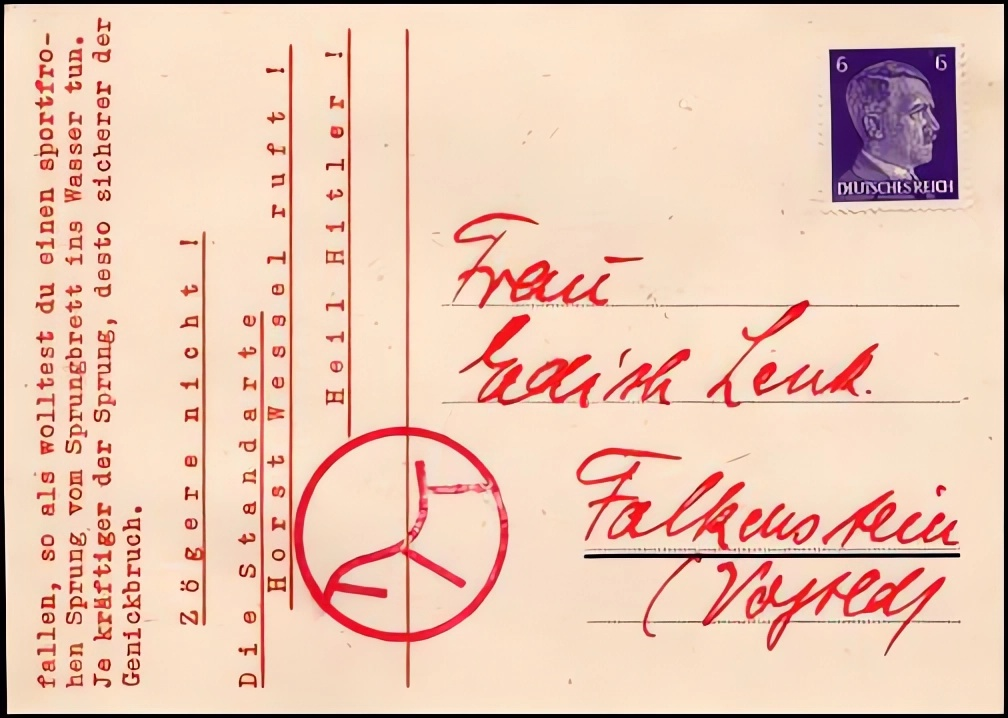 Von der Britischen Regierung (PWE) hergestellte Propagandapostkarte im Rahmen der Operation Periwig